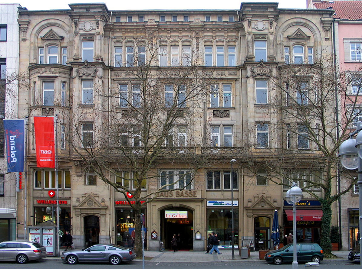 Frontalansicht auf das Haus Basse im Winter, wenn die unbelaubten Bäume einen relativ freien Blick auf das Gebäude erlauben ...